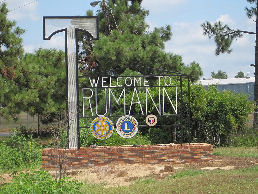 Trumann, Arkansas